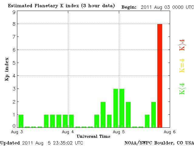 NOAA-SWPC real time monitor-Estimate 3-hour Planetary Kp-index, early days August 2011 (G4 geomagnetic storm in progress)